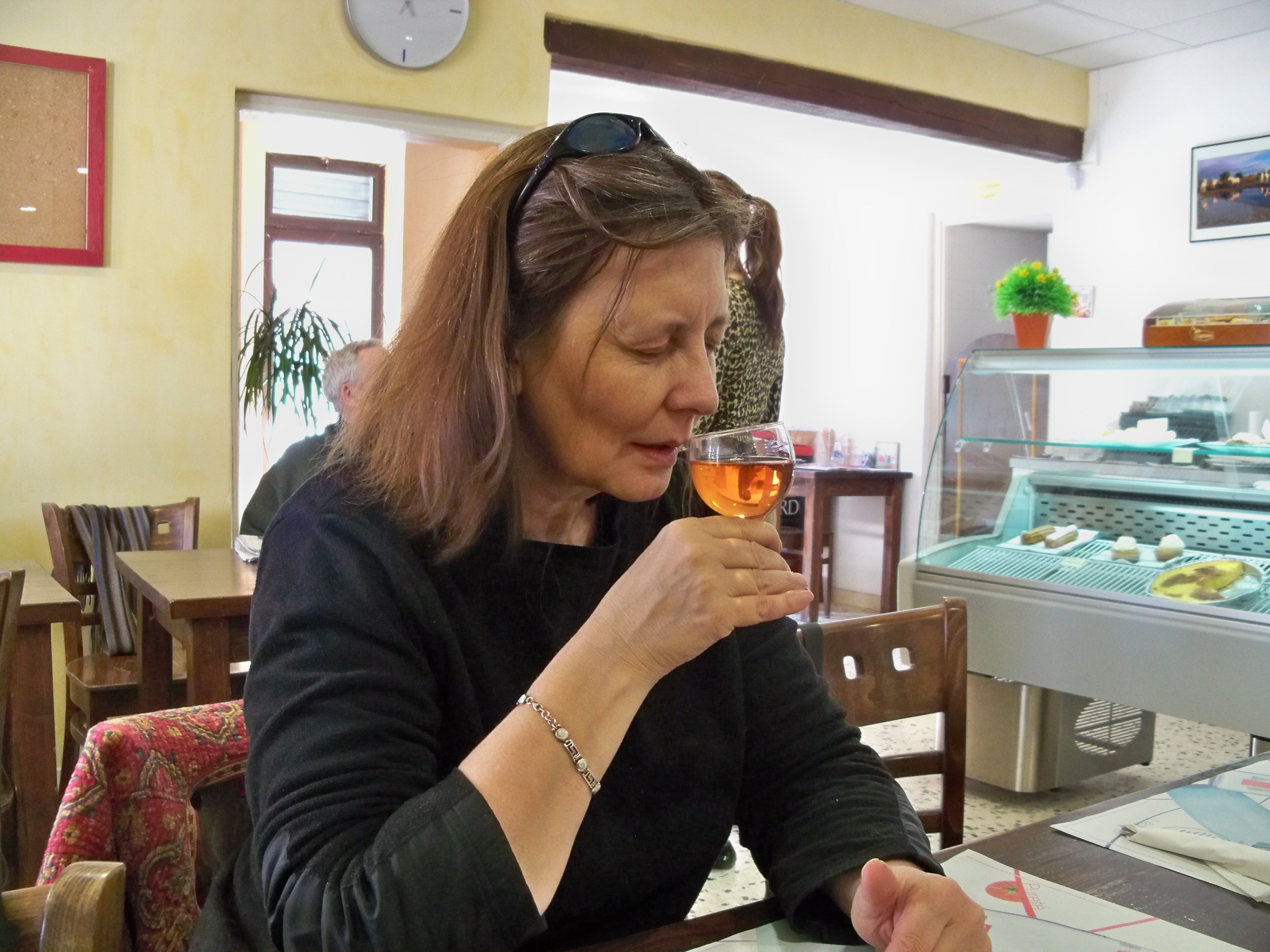 Degustation - Humer